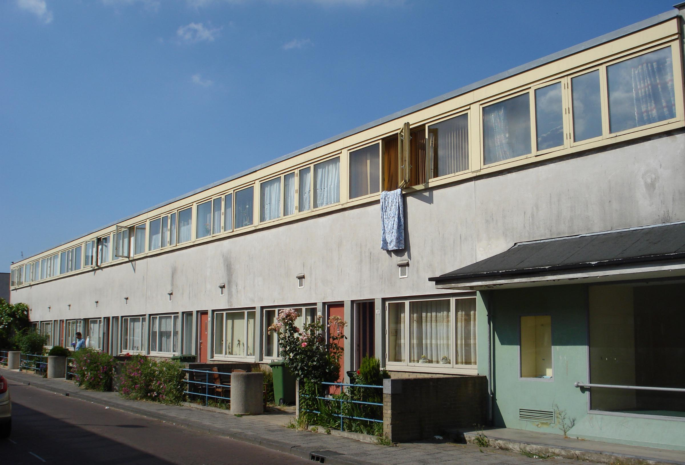 Rotterdam, Heer Arnoldstraat 18-28. Rijksmonument.